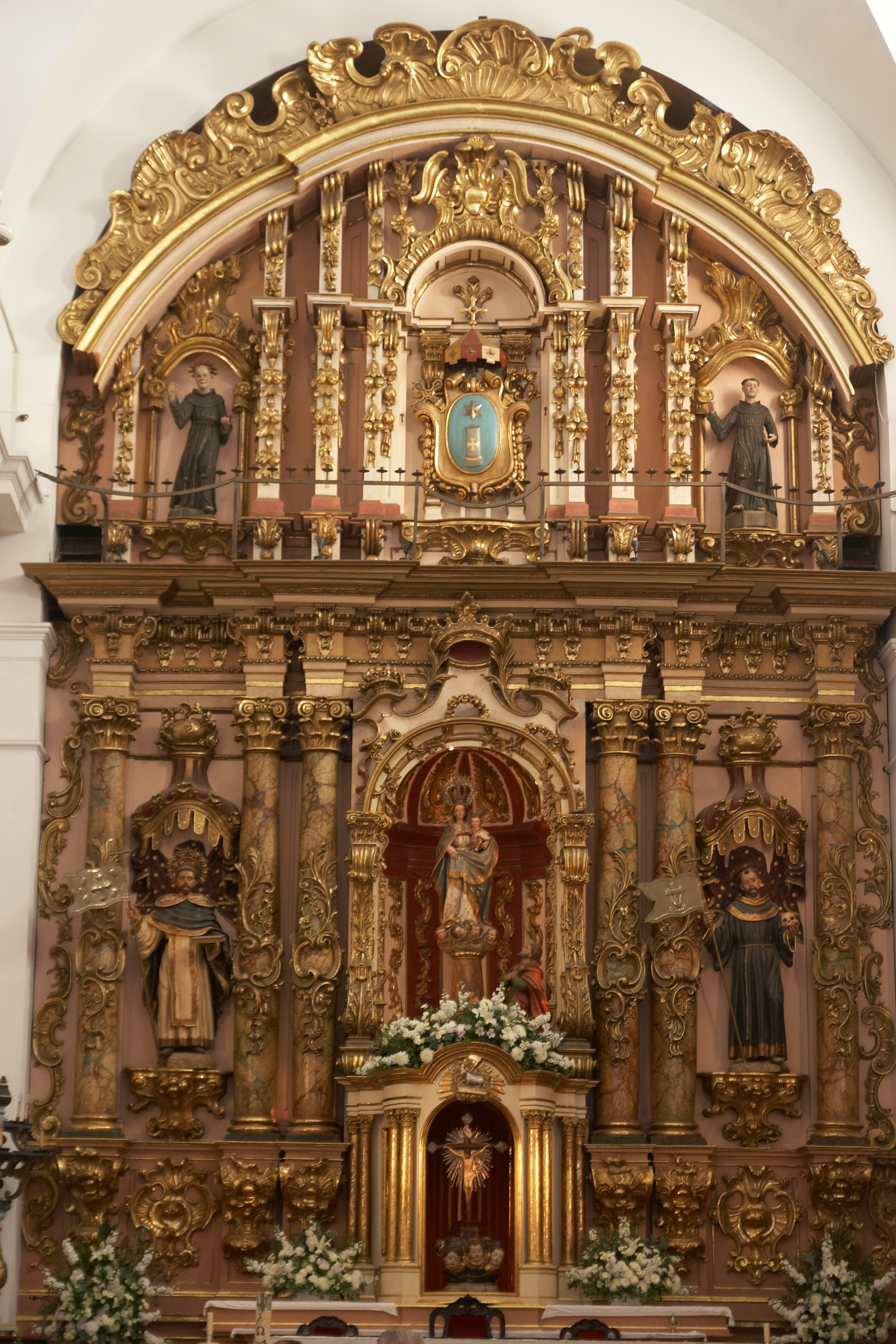 Parroquia de Nuestra Señora del Pilar, Recoleta, Buenos Aires, Argentina.